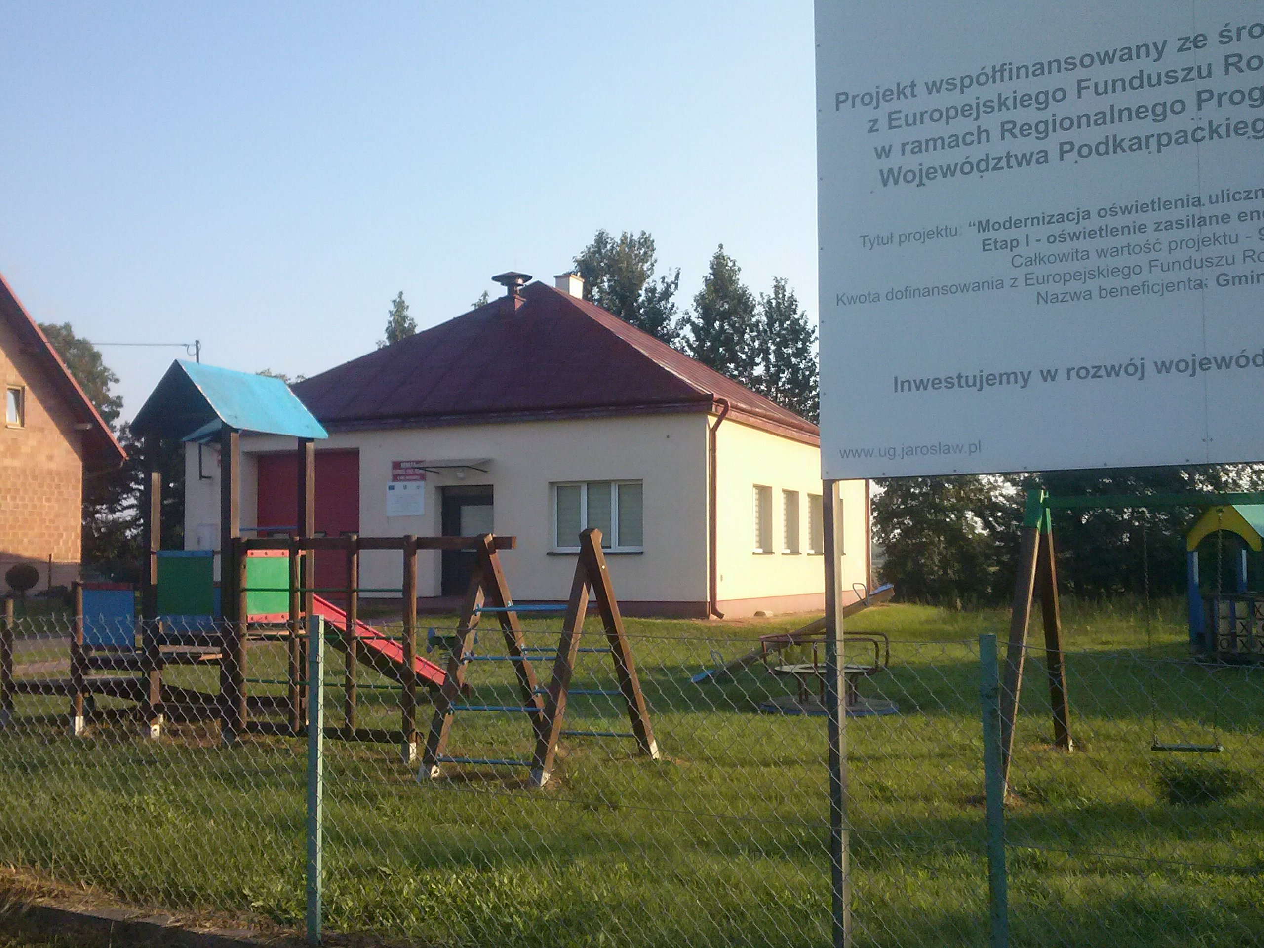 Remiza OSP w Woli Buchowskiej (Dąbrowie)